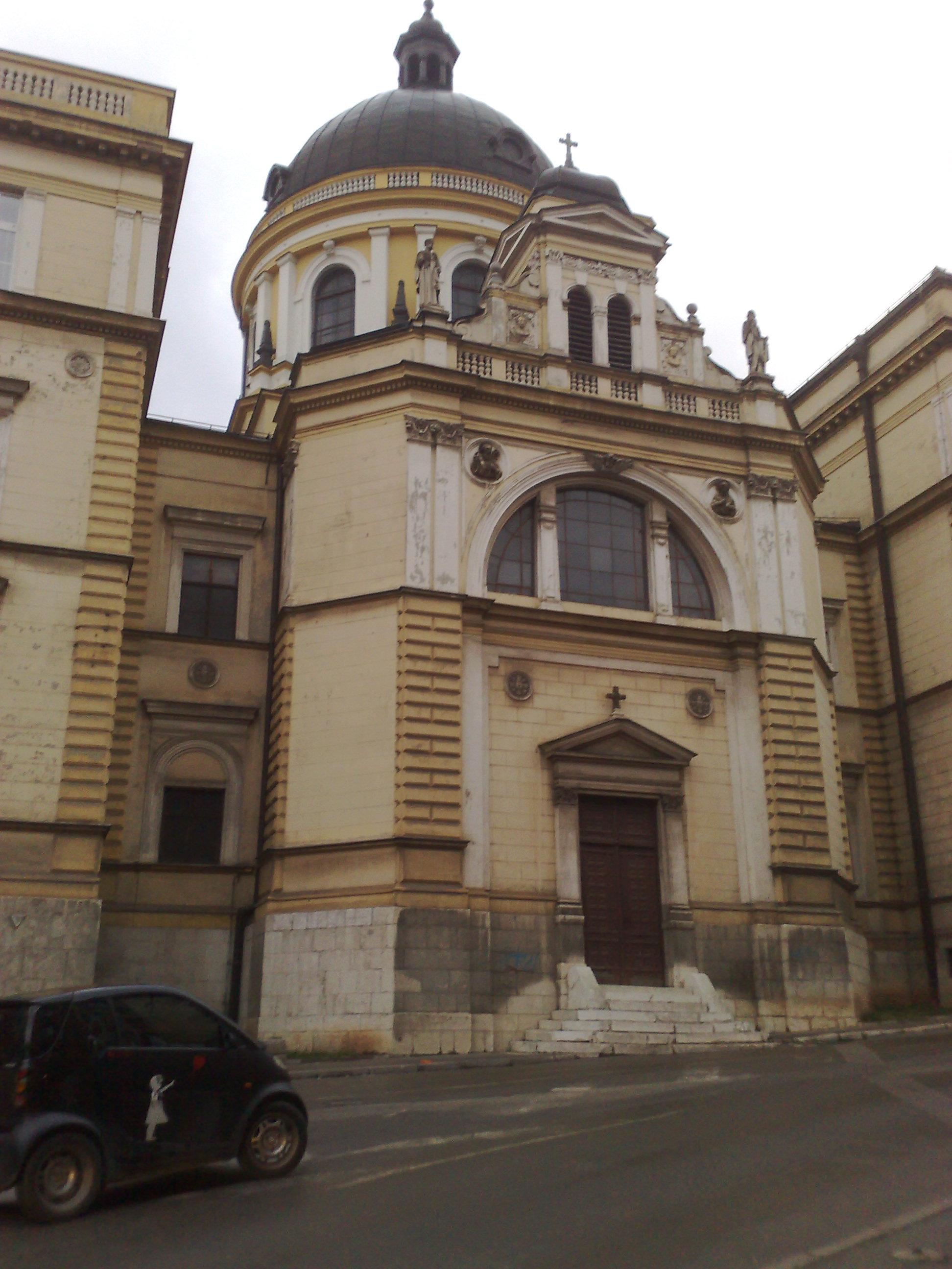 Slika Crkve Svetih Ćirila i Metoda u Sarajevu.